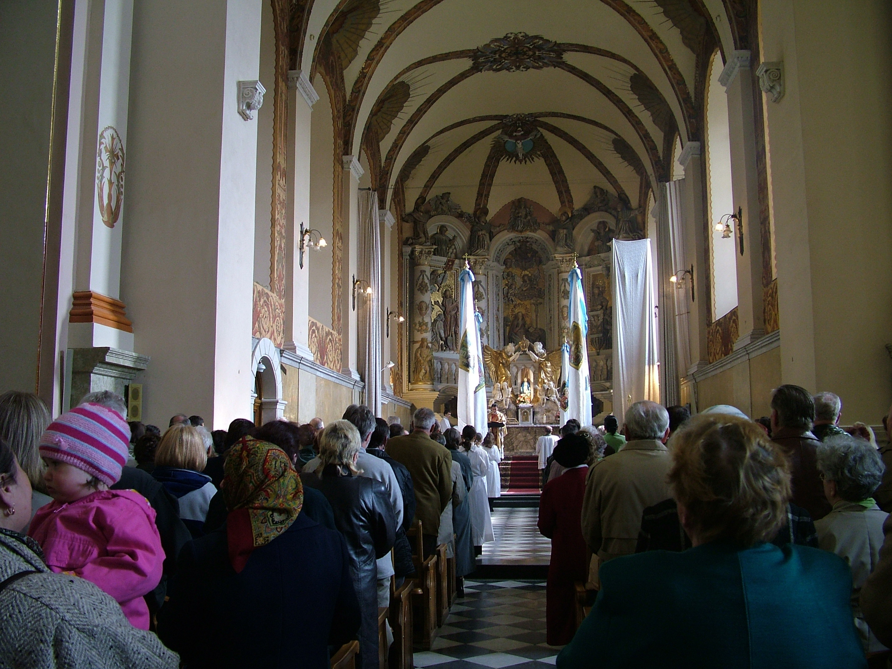 Kościół św. Marii Magdaleny we Lwowie. Widok nawy głównej w kierunku ołtarza. 1 maja 2005.